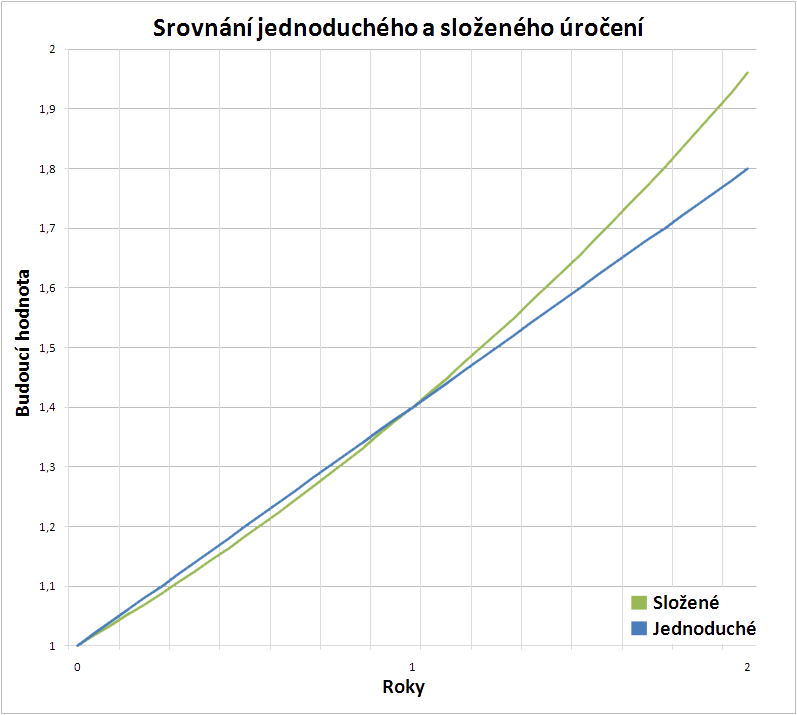 Srovnání jednoduchého a složeného úročení